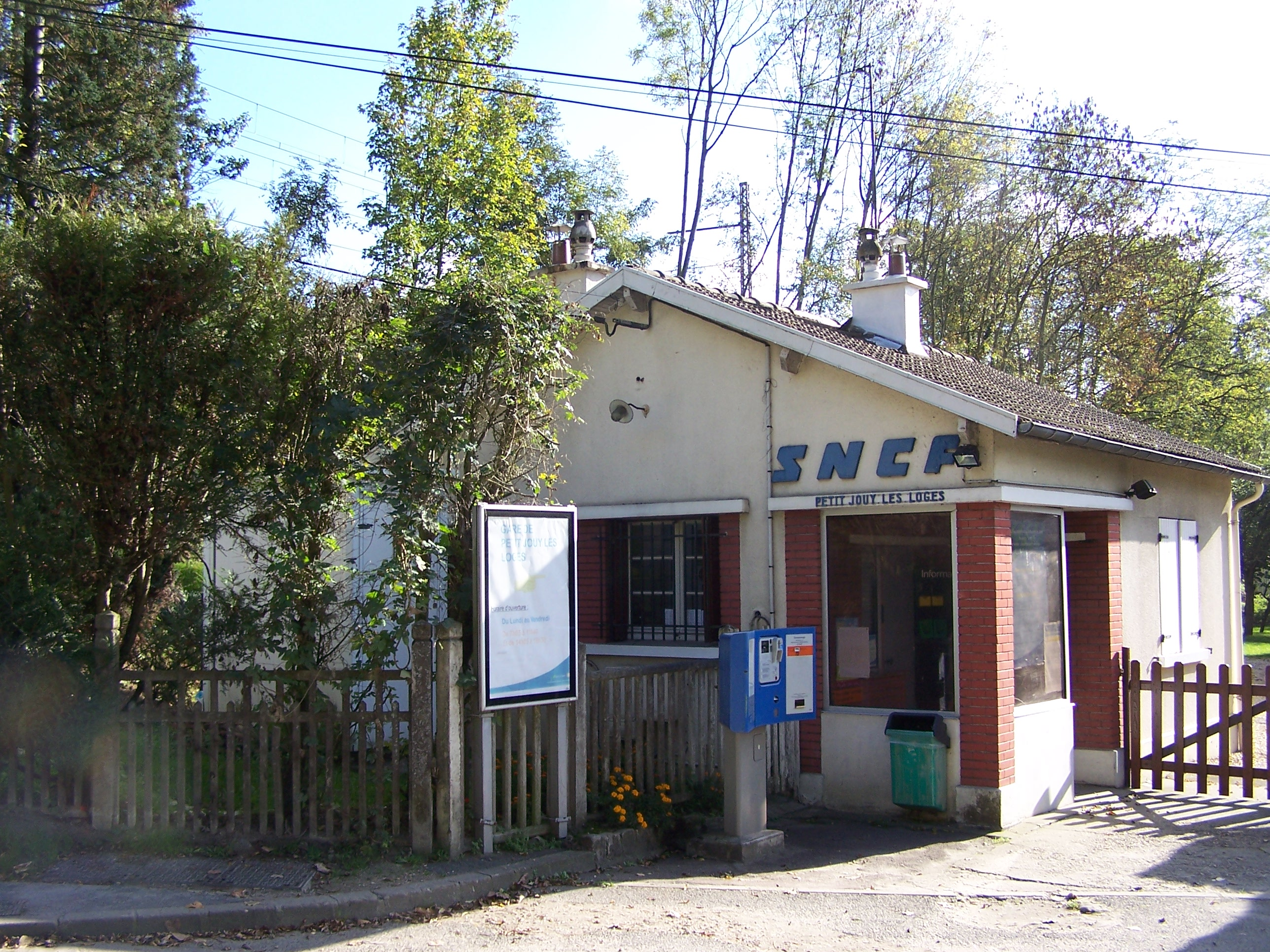 Gare du Petit-Jouy à Jouy-en-Josas (Yvelines, France)